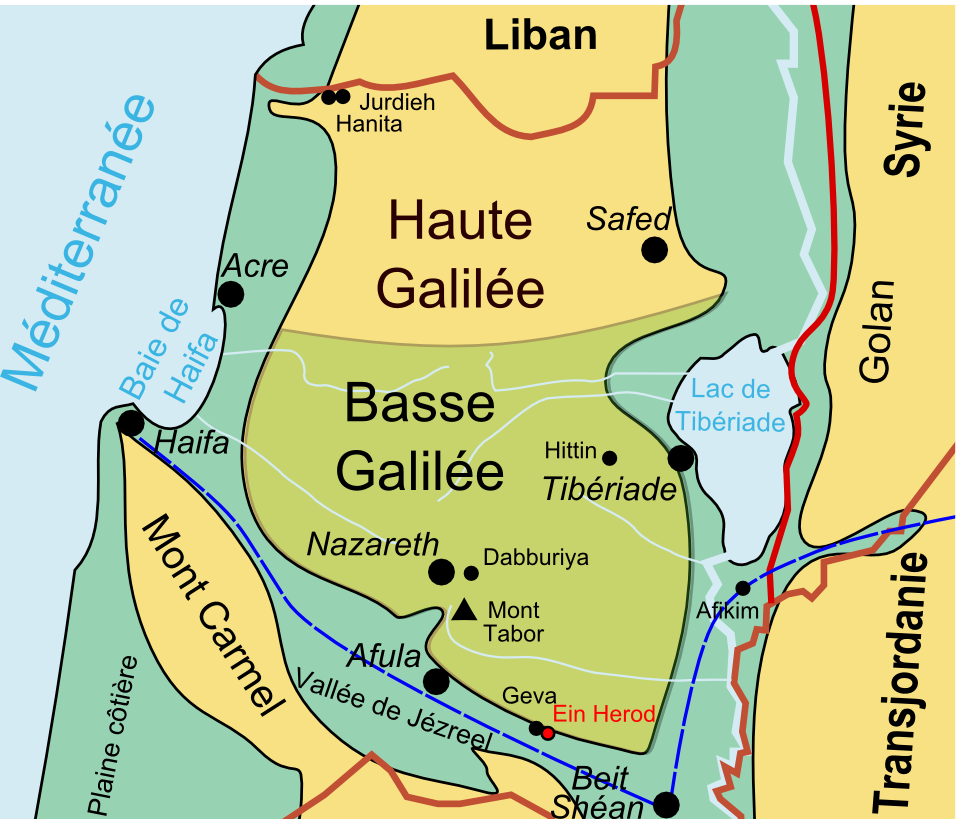 Carte du nord de la Palestine mandataire avec les principaux centres d'opérations des Special Night Squads en 1938